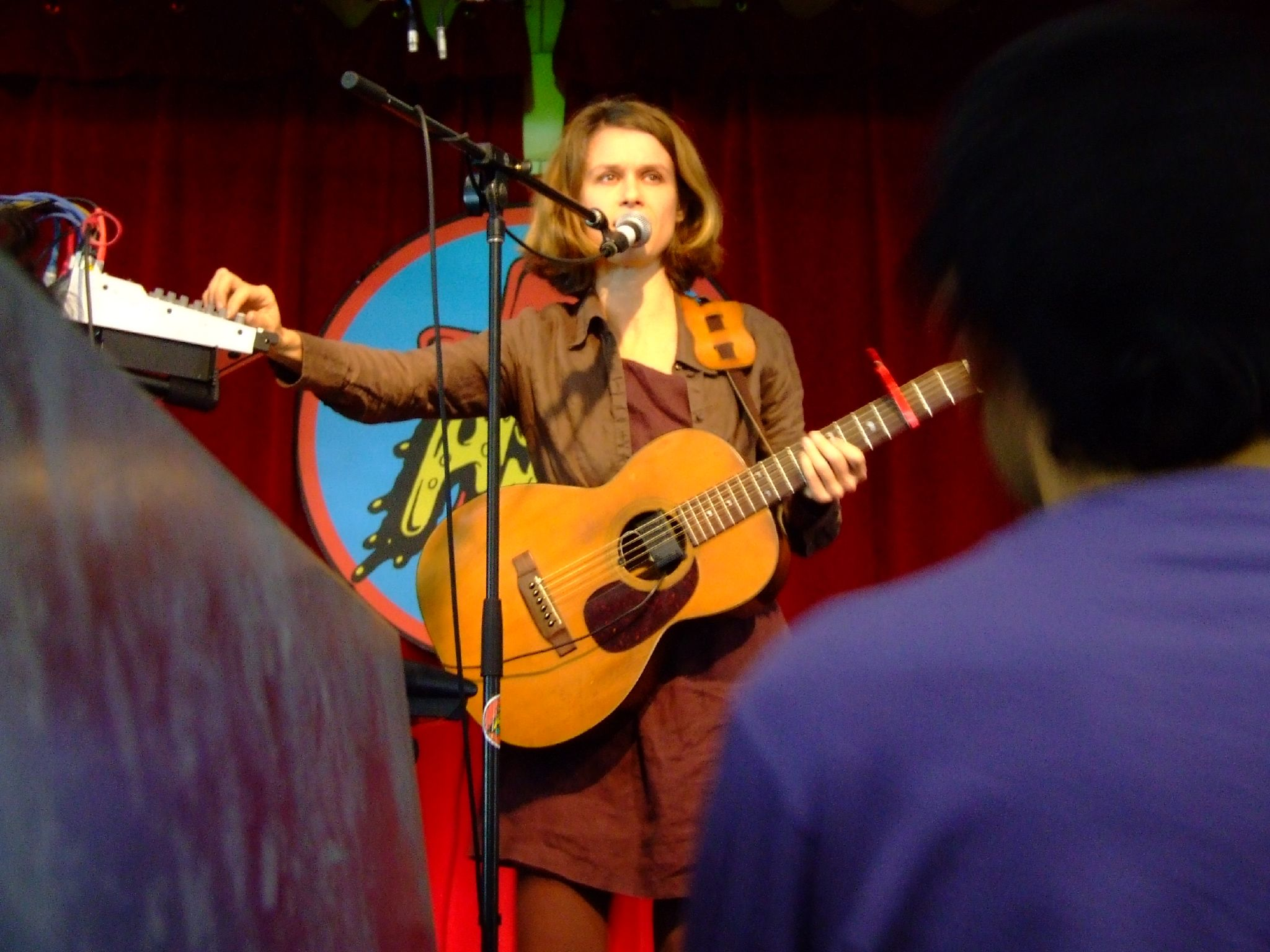 Argentine singer Juana Molina at Los Angeles.